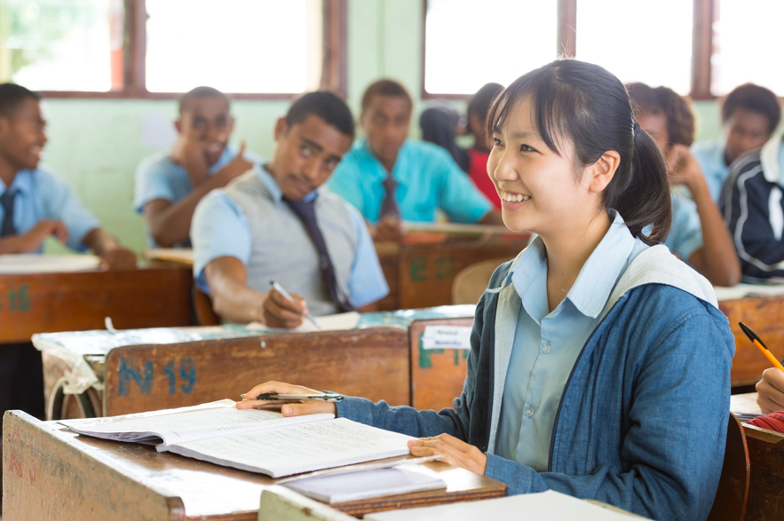 Ba Provincial Free Bird Instituteの授業風景